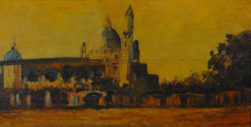 Basilica de Lourdes, Quinta Normal